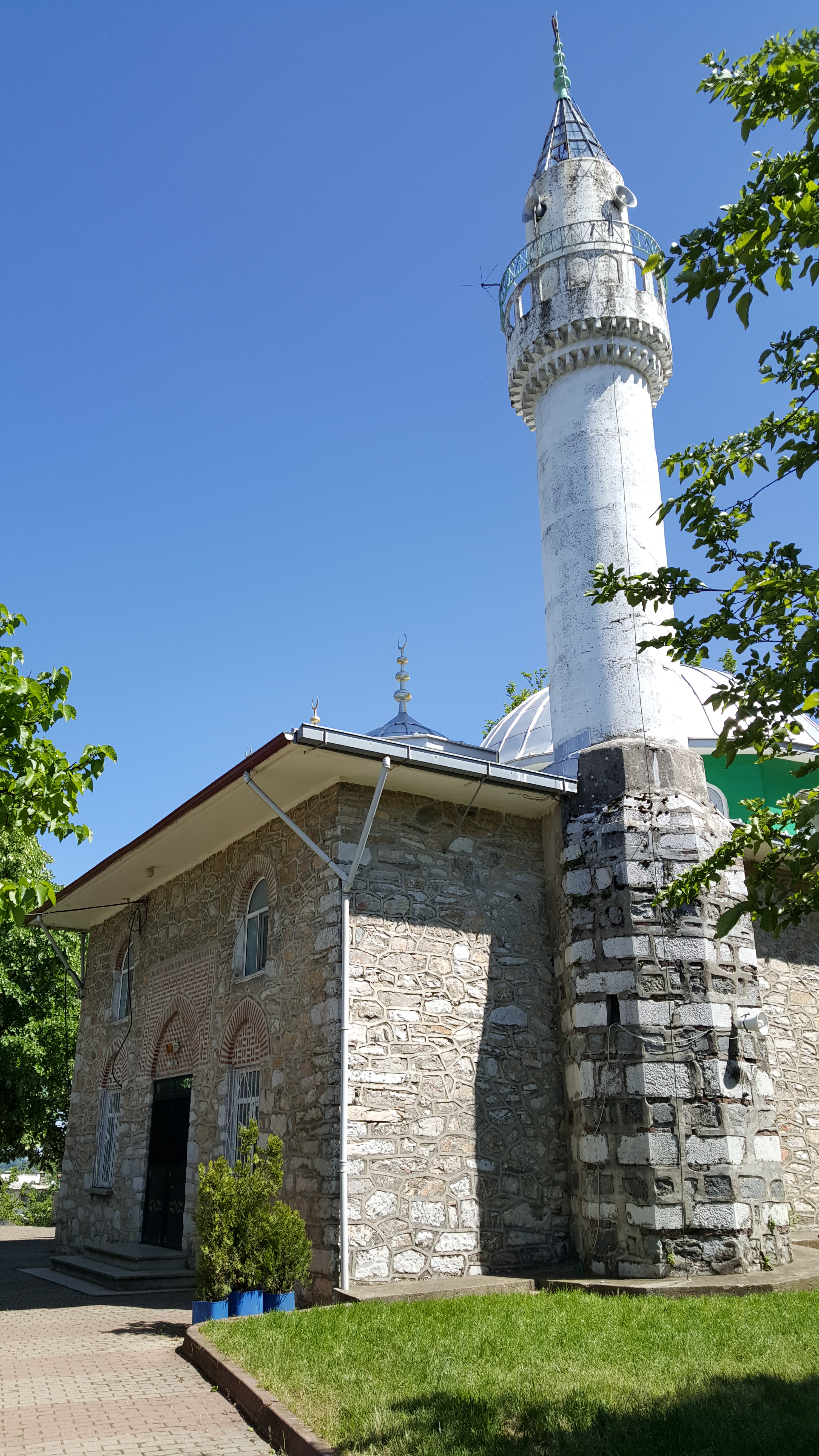 Bursa'nın Alaçam Köyü'nün camisi